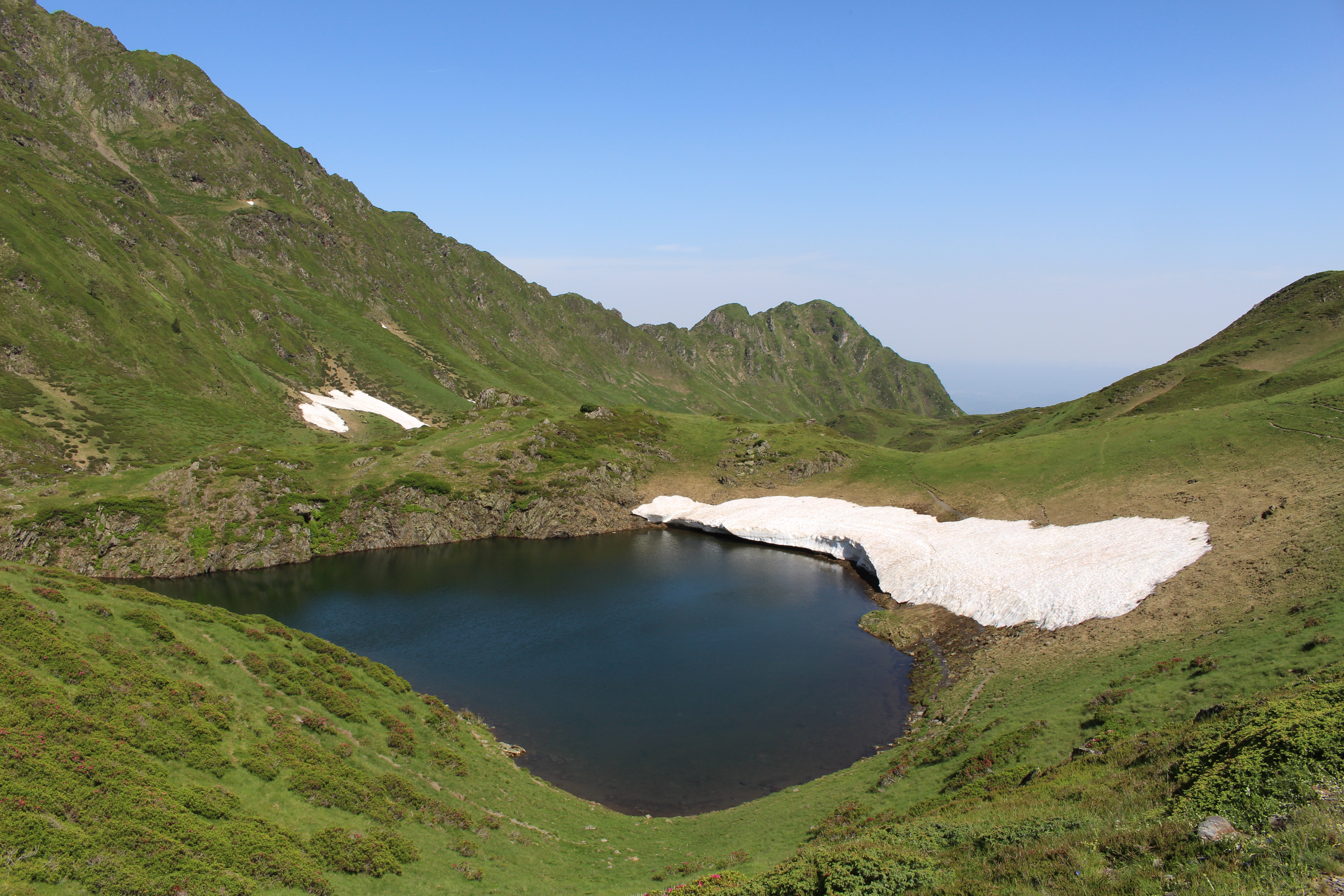 Lac de l'Oeuf (Hautes-Pyrénées)